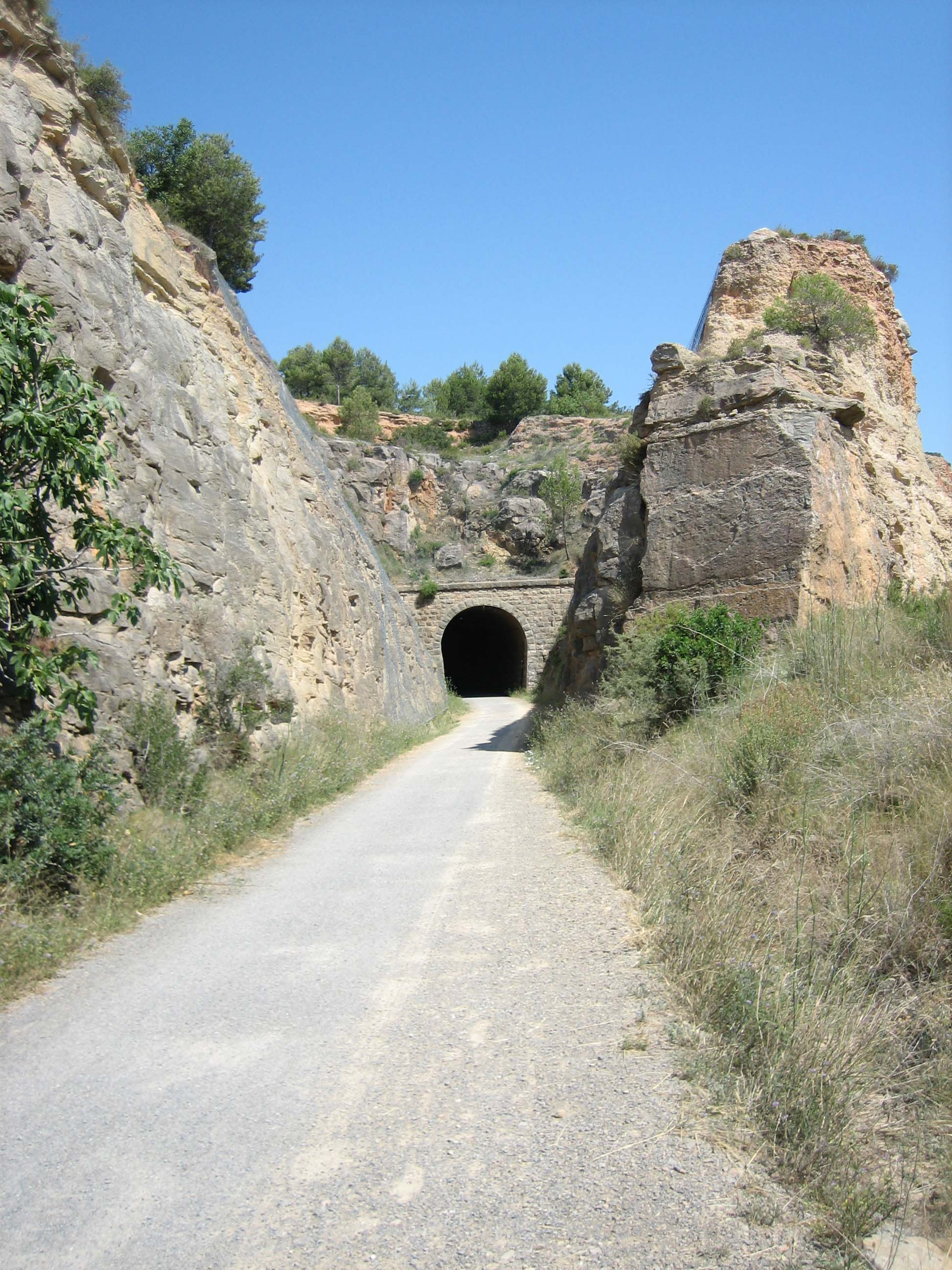 Segorbe / Alto Palancia